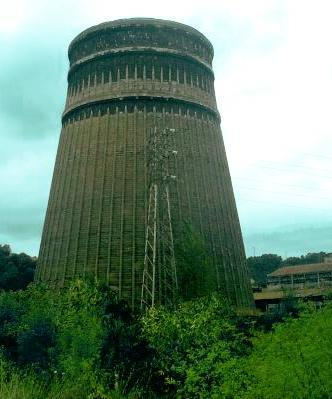 Fábrica de Nitrastur (Langreo-España) / Factory Nitrastur (Langreo-Spain)